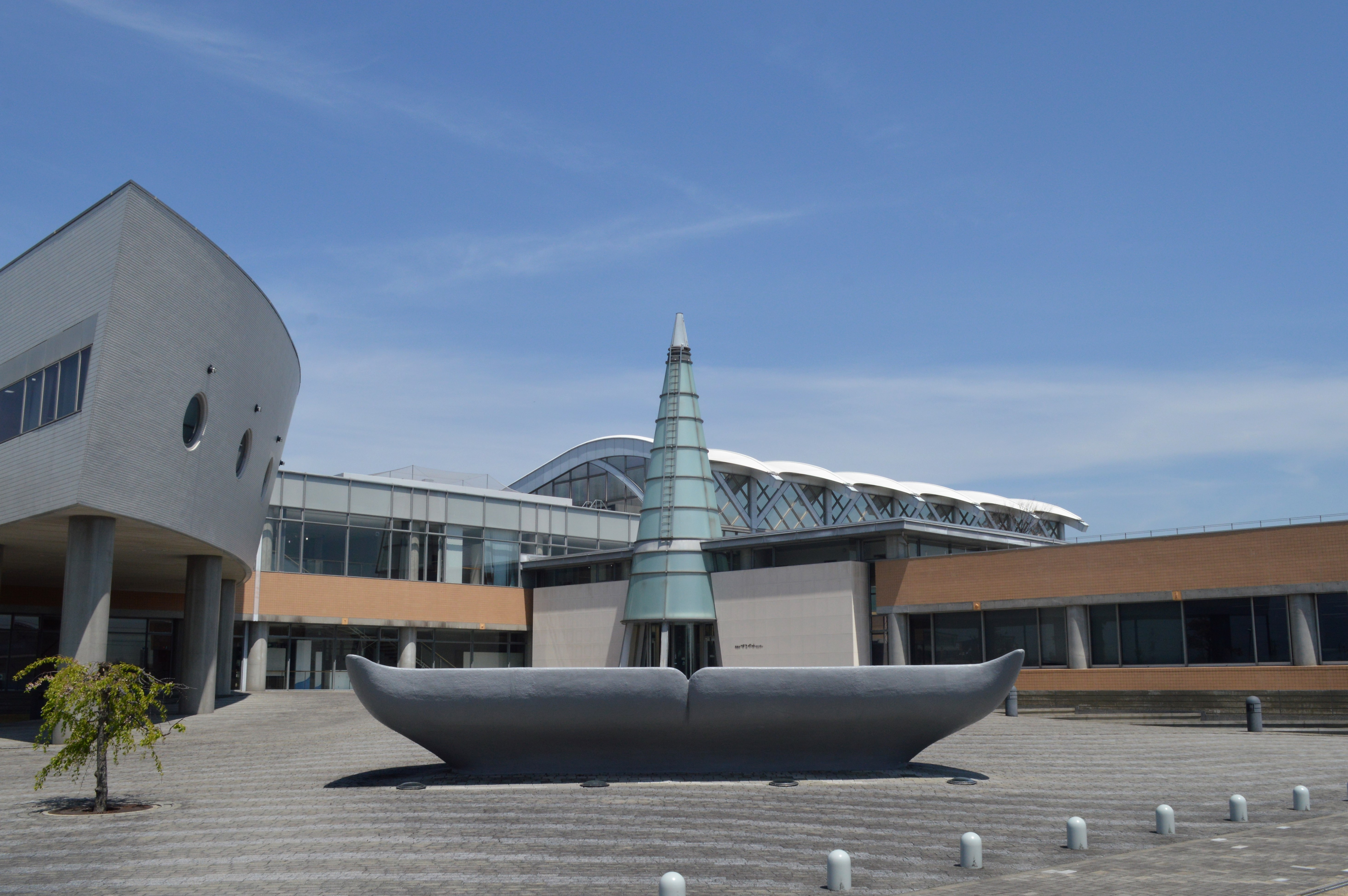 愛知県海部郡飛島村にある飛島村すこやかセンター。飛島村図書館などが入っている。